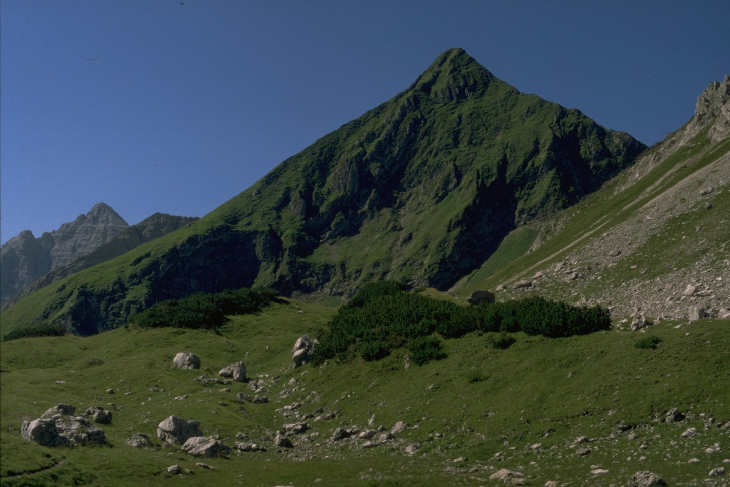 Lärchwand vom Notländsattel